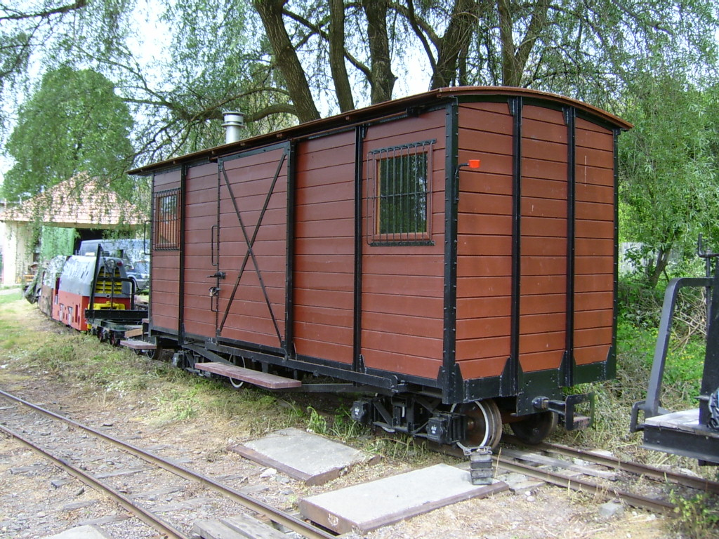 Korábban a Szigetvári Gazdasági Vasúton közlekedő teherkocsiból szükségszemélykocsivá alakított kocsi a Kemencei Erdei Múzeumvasúton.